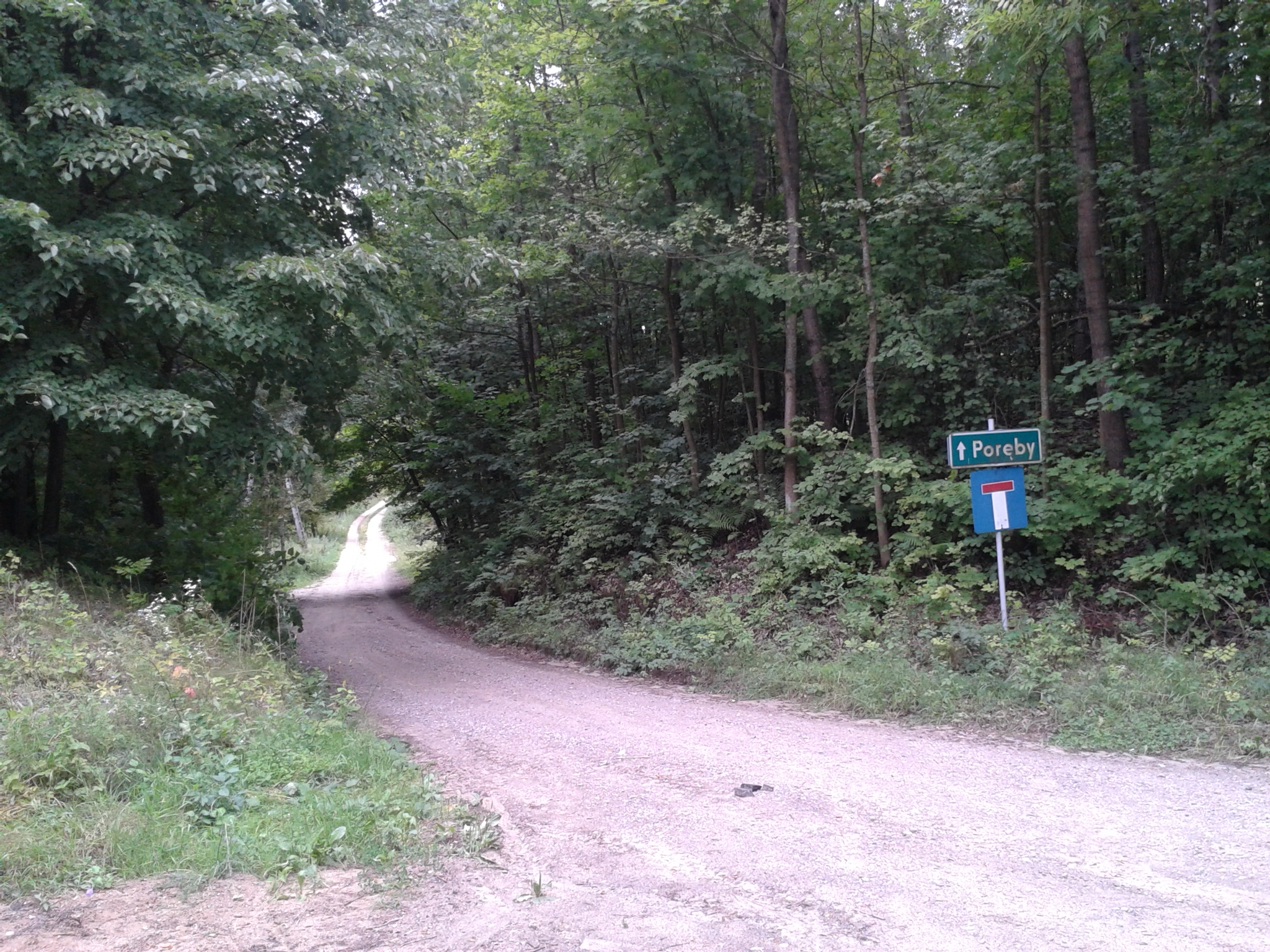 Droga do Poręb